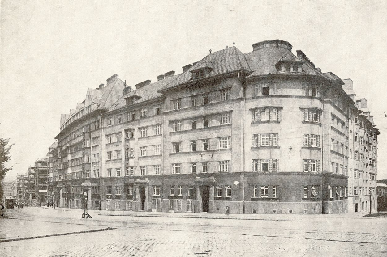 Metzleinstalerhof - 1. Gemeindebau in Wien (1919-1920)